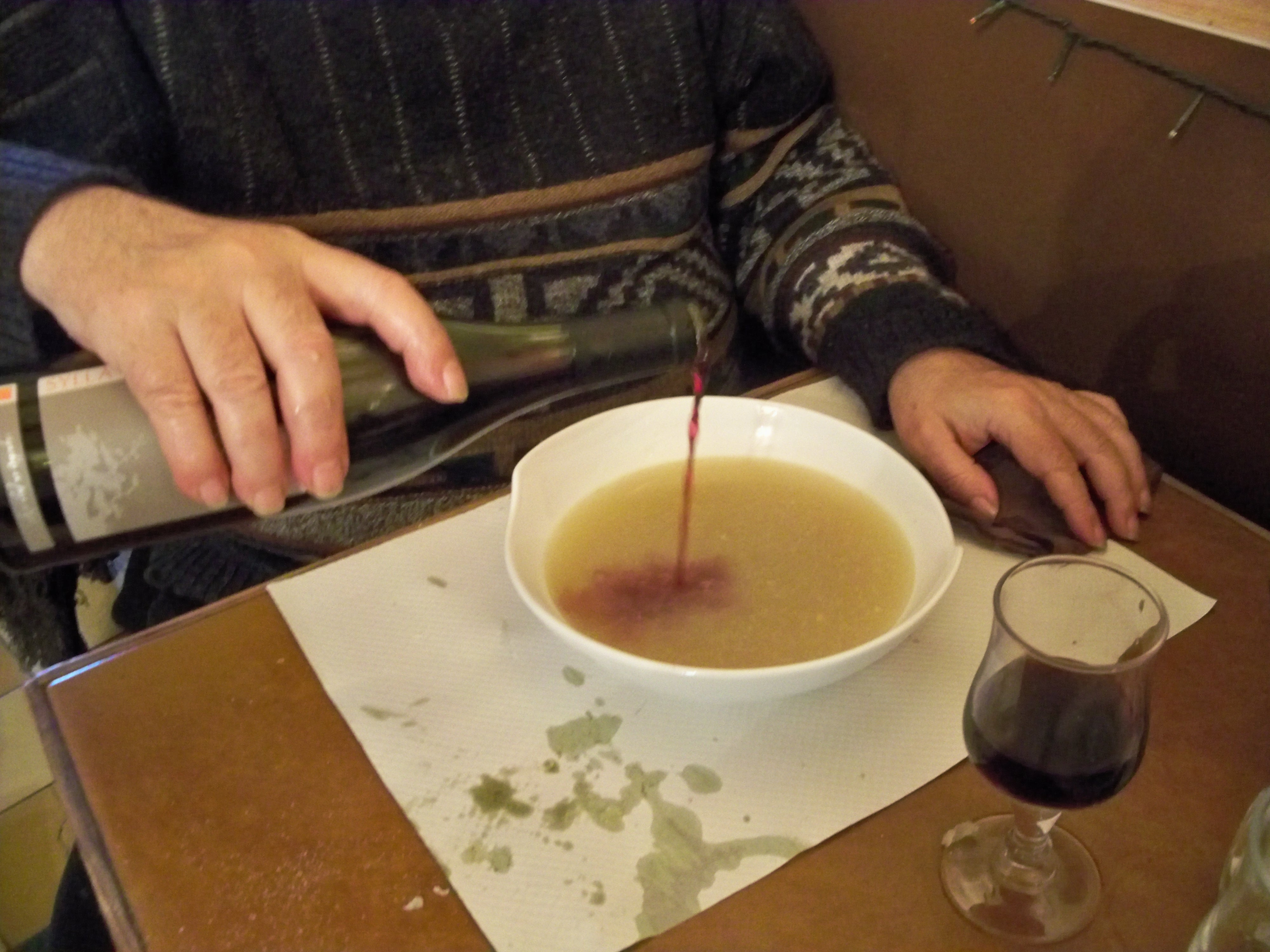 Faire Chabrot, tradition occitane de vin dans la soupe